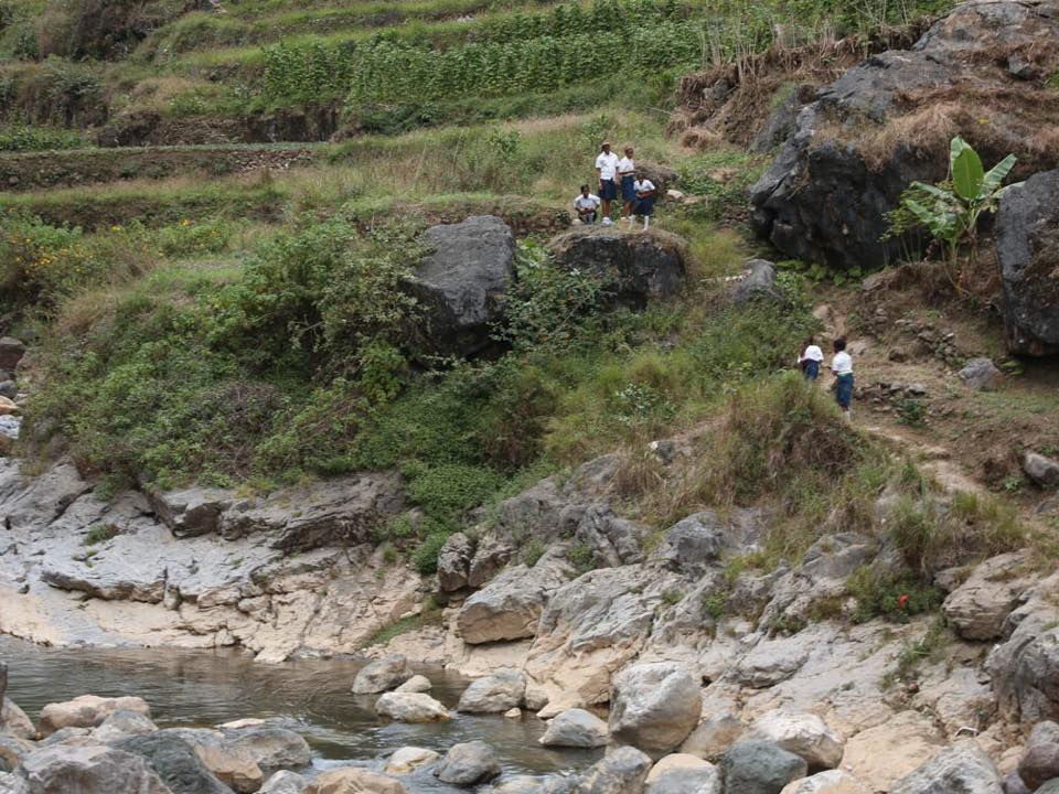 Atsabe